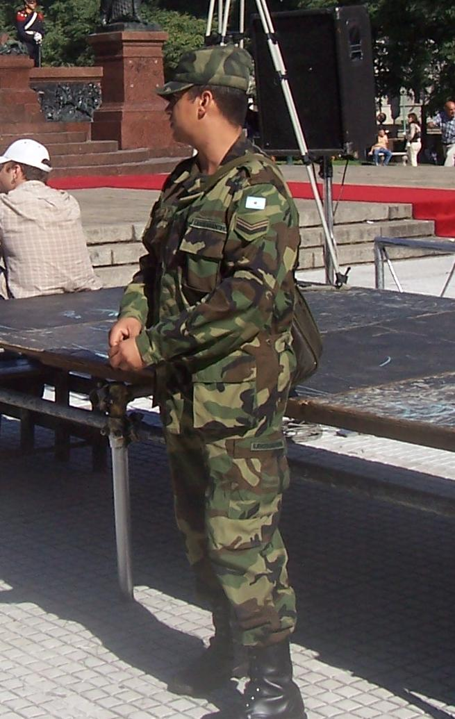 Oficial del Ejército Argentino, en un acto realizado en la plaza San Martín de Buenos Aires.